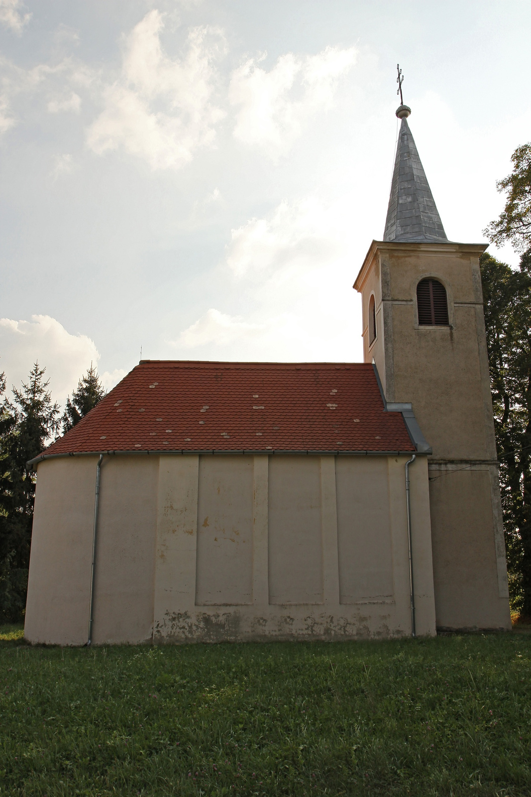 Zalamindszenti r. k. kápolna (Zalalövő, Petőfi Sándor utca 98.) This is a photo of a monument in Hungary, Identifier: 11090